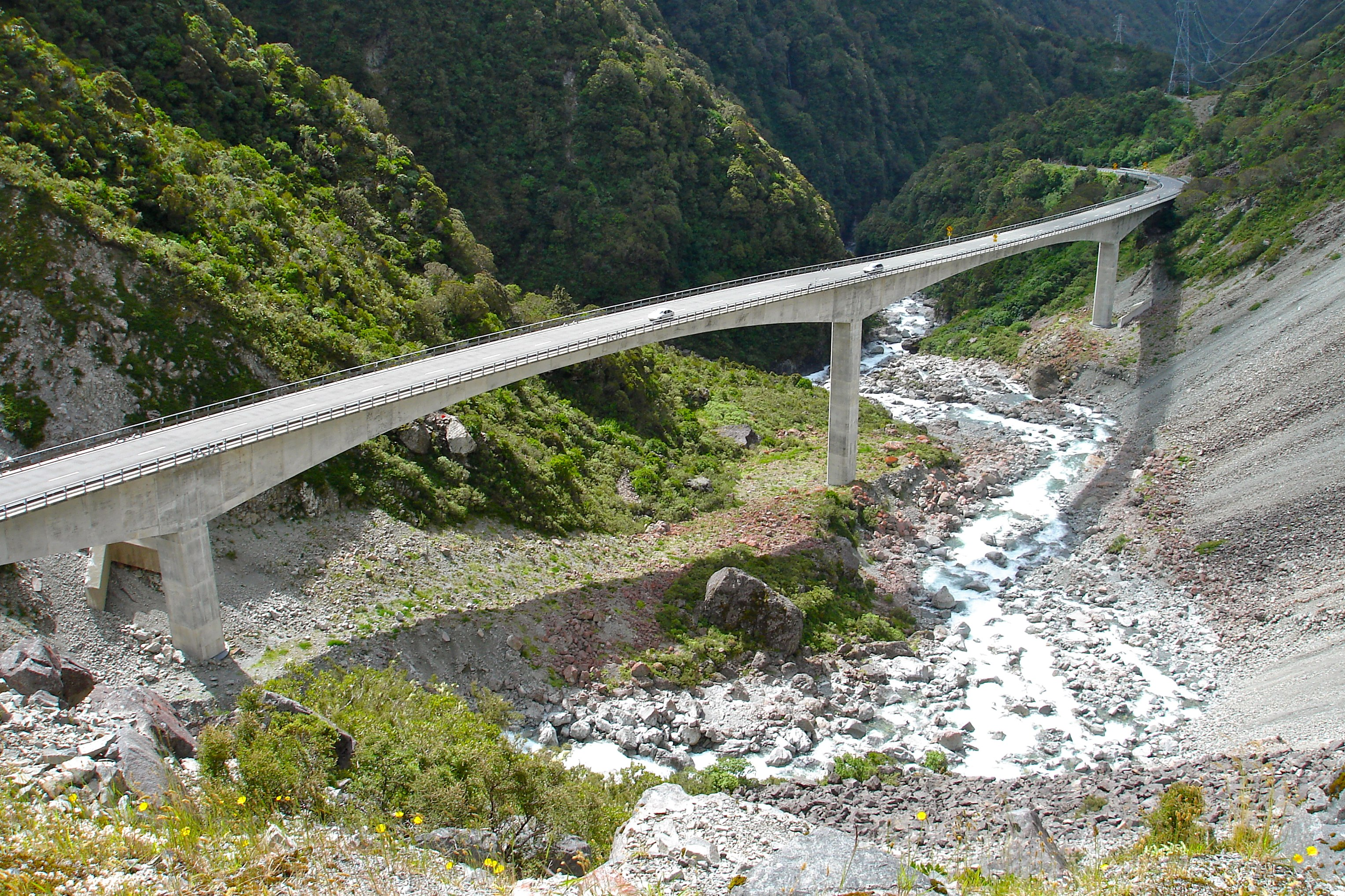 Otira Viaduct in Otira Gorge.